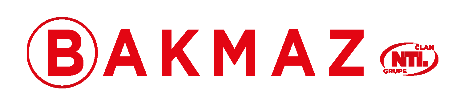 Logotip Bakmaza